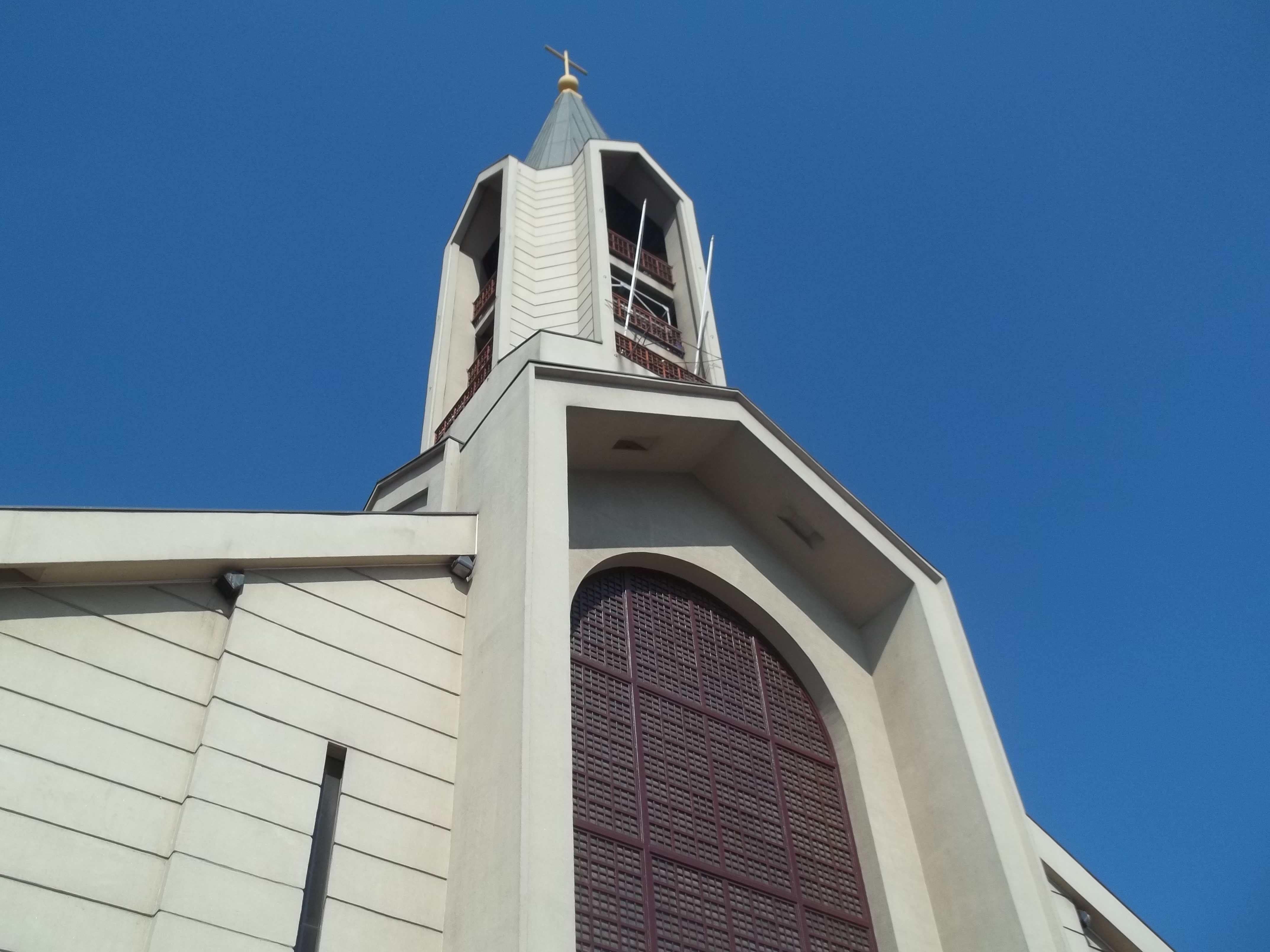 Catedral de San Bernardo